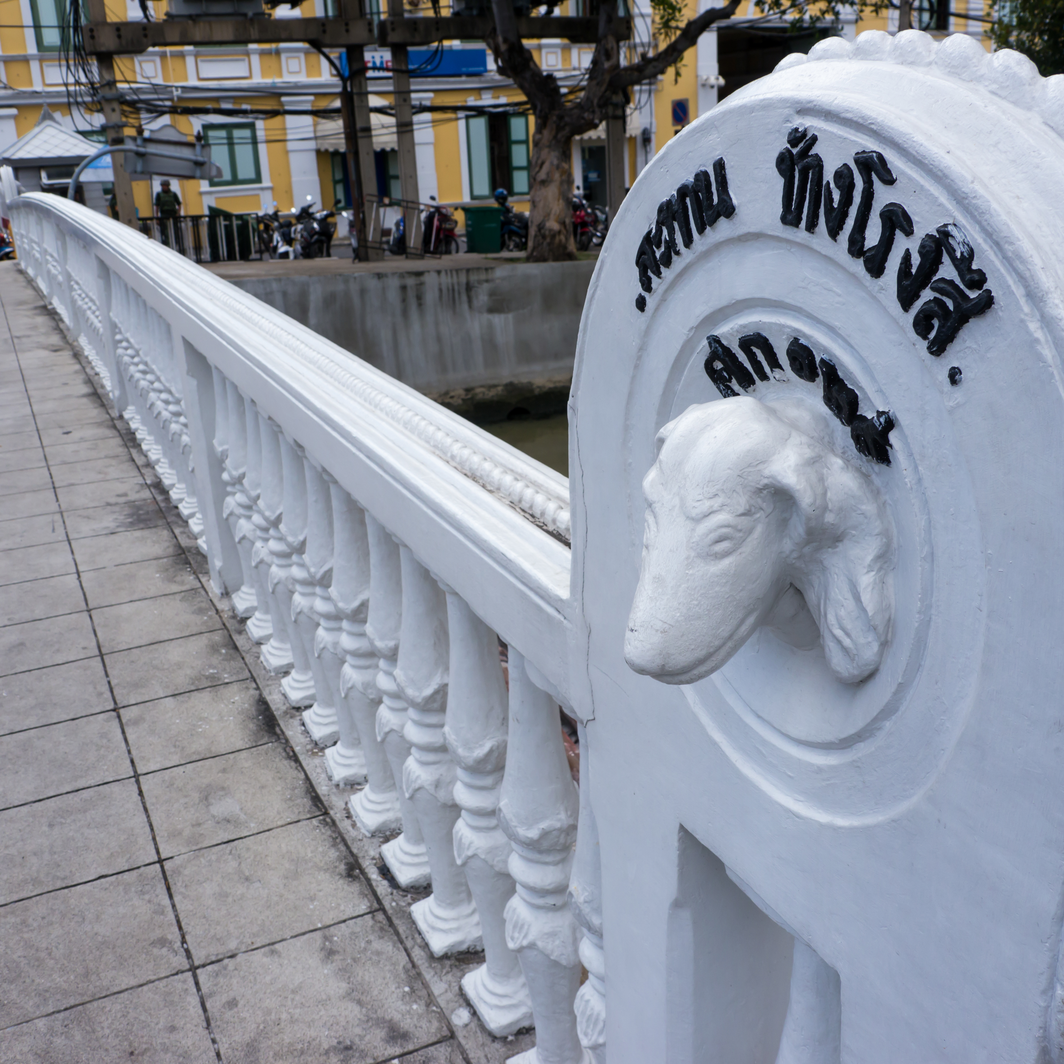 สะพานช้างโรงสี